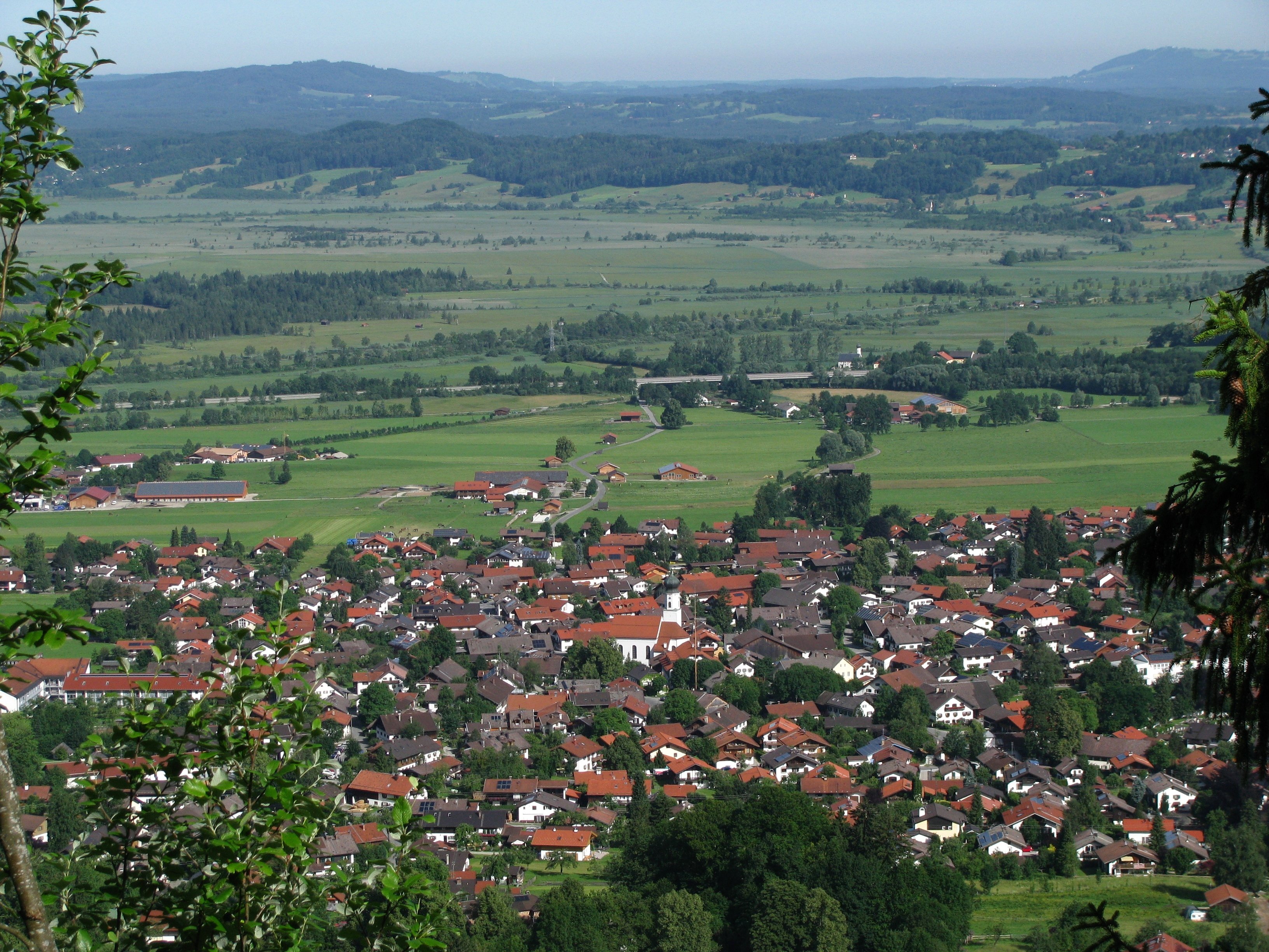 Burgstall Schaumburg; Ausblick Richtung Ohlstadt und Murnauer Moos.